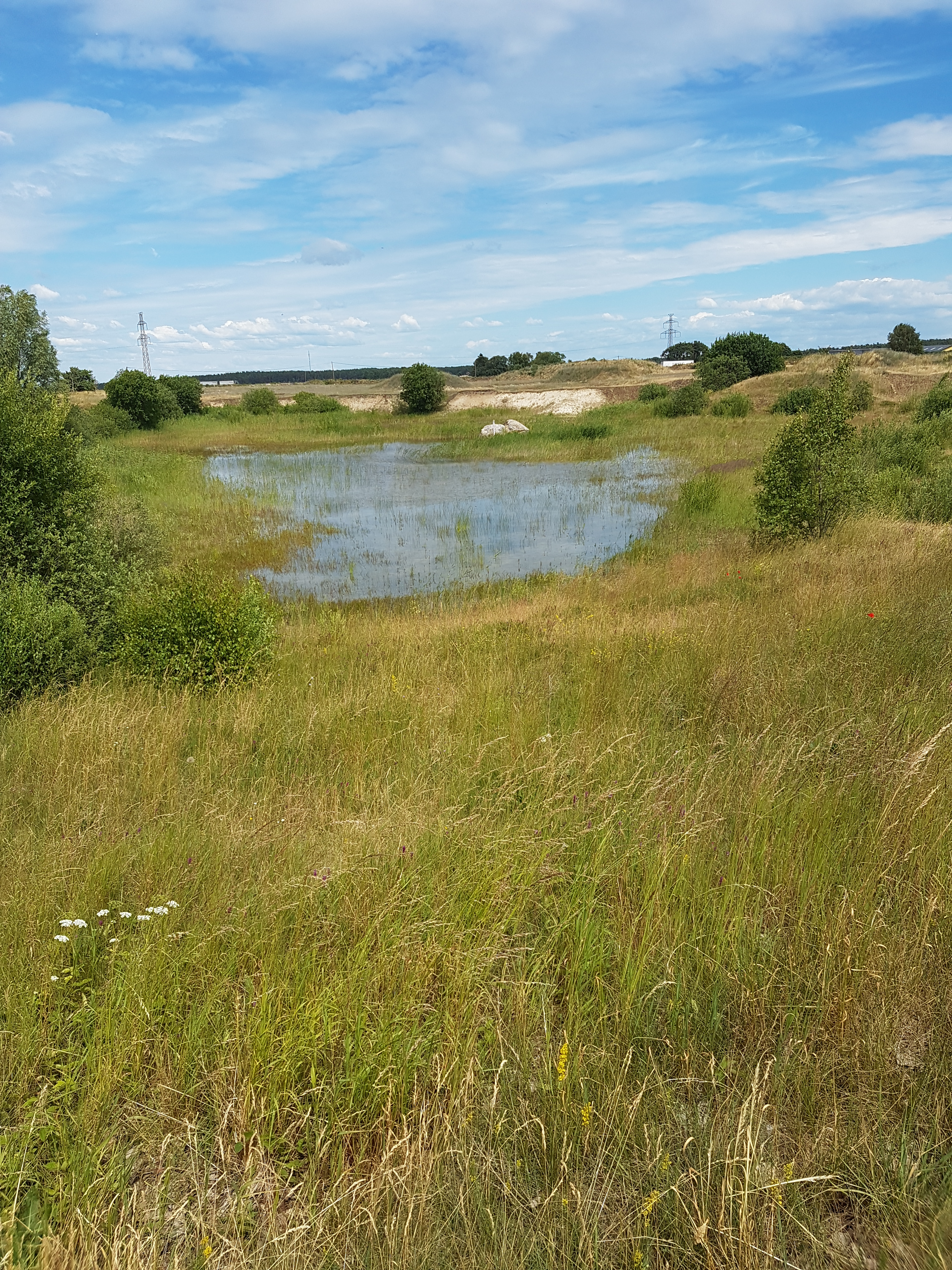 Grodgropen i naturreservatet Sånnarna, juni 2018.